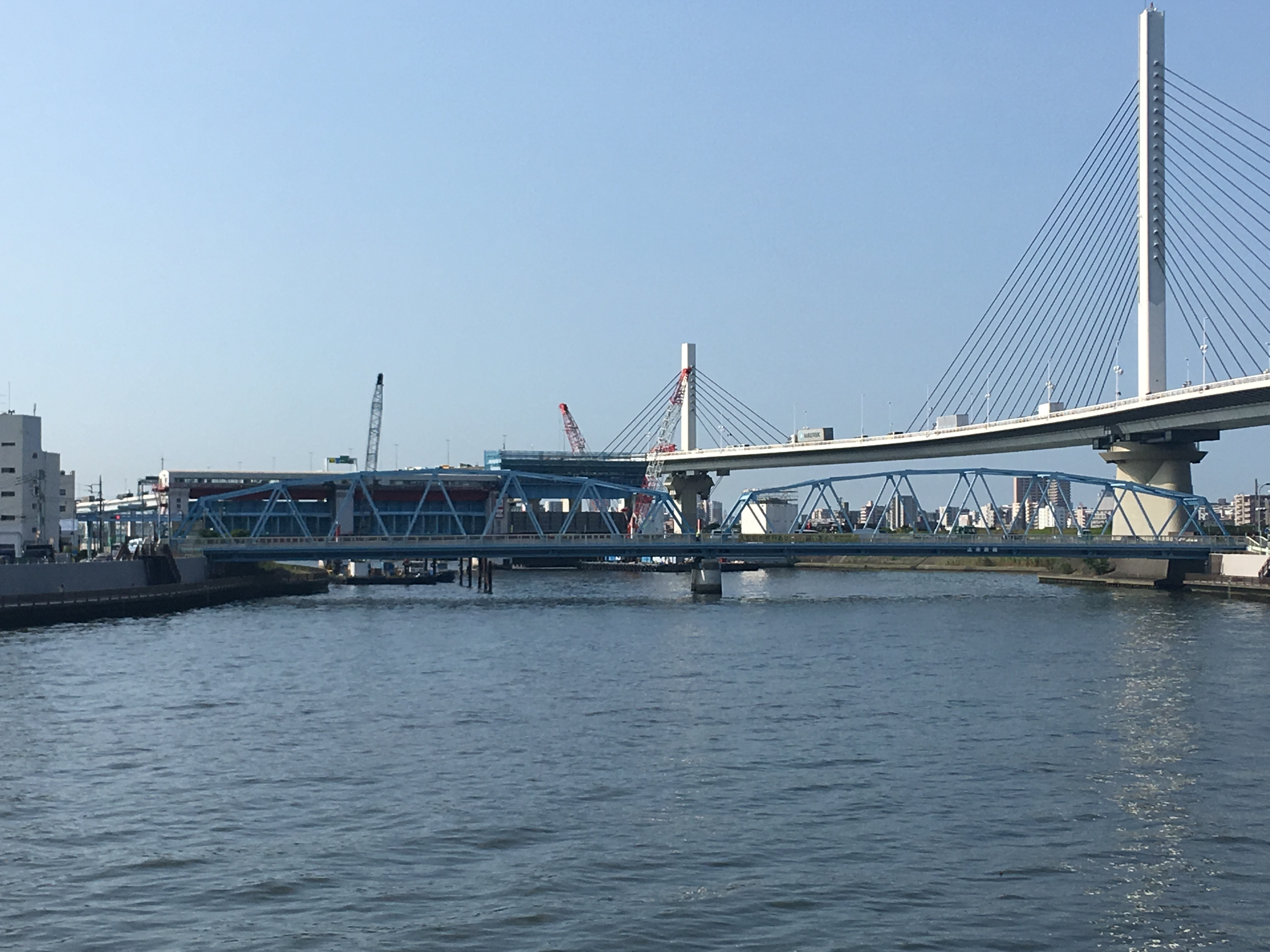 東京都葛飾区にある上平井橋。奥に上平井水門、右にかつしかハープ橋。